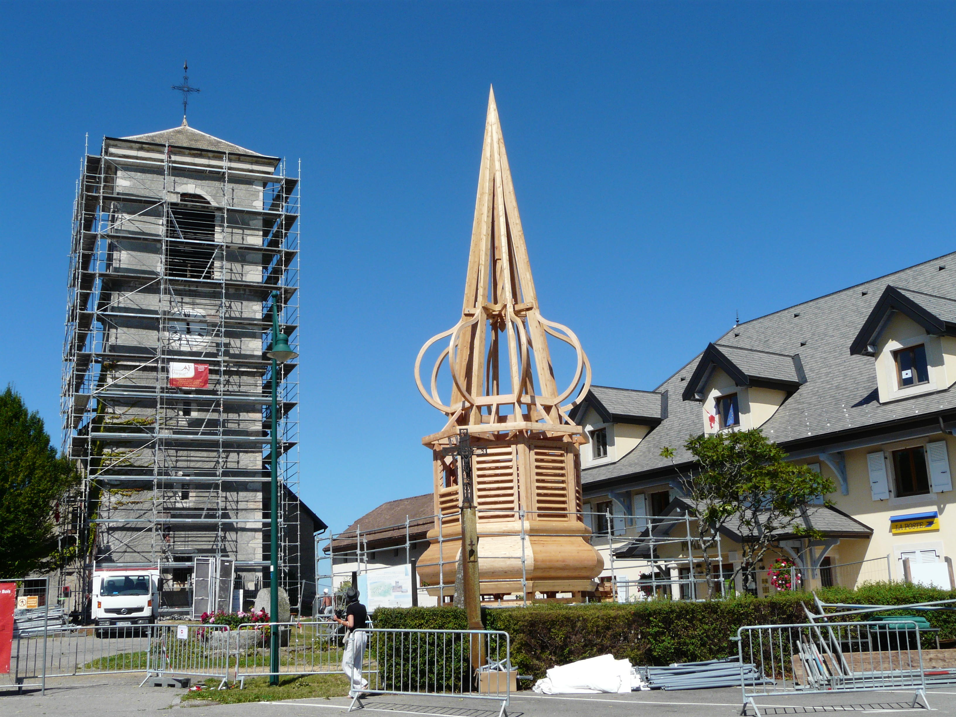 La charpente du clocher à bulbe de Saint-Paul-en-Chablais en construction devant léglise et la mairie, 17 août 2012